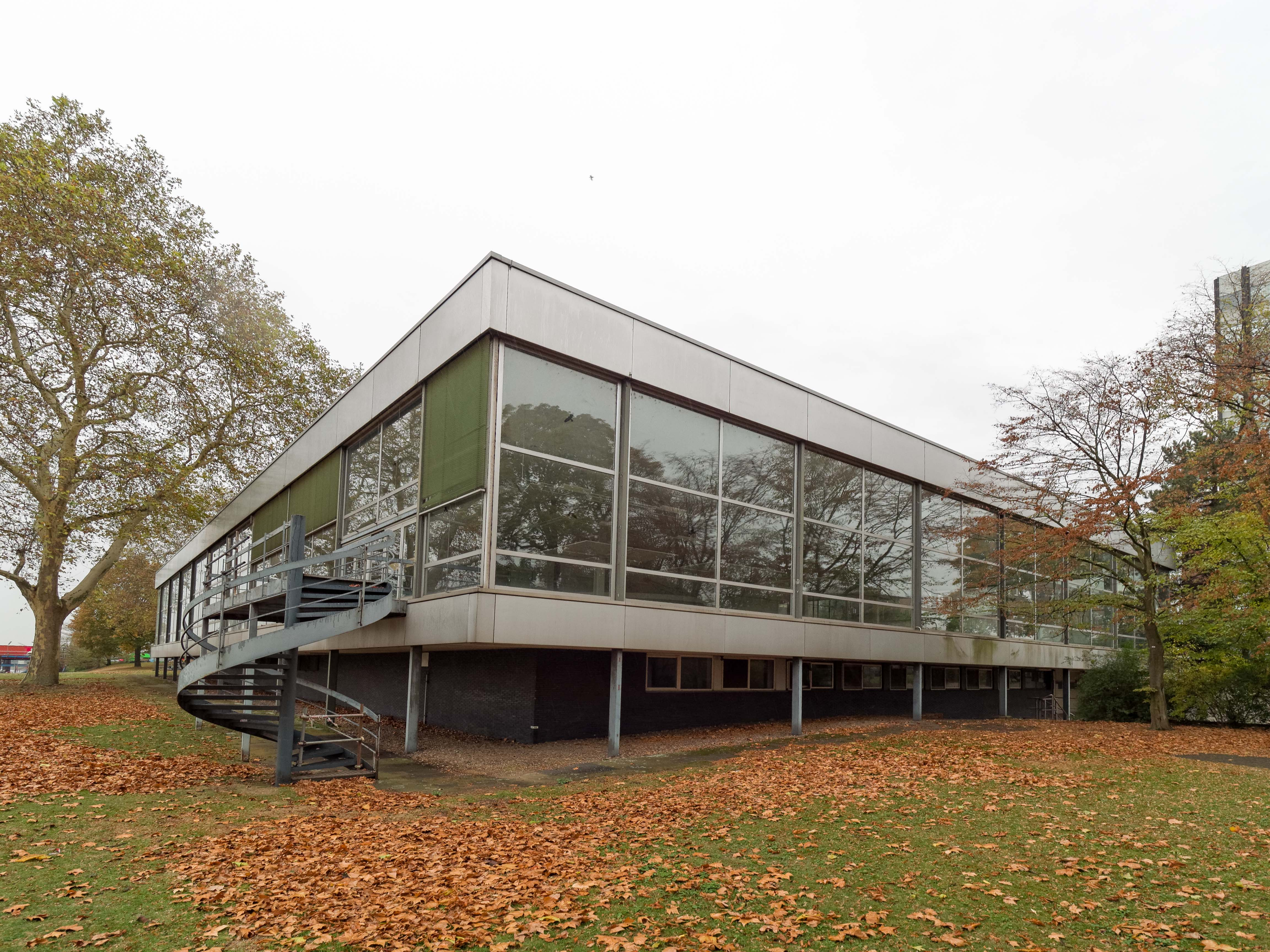 Baudenkmal Krefeld 995: Ehemaliges Kasino R 55 des Bayer-Werks Uerdingen